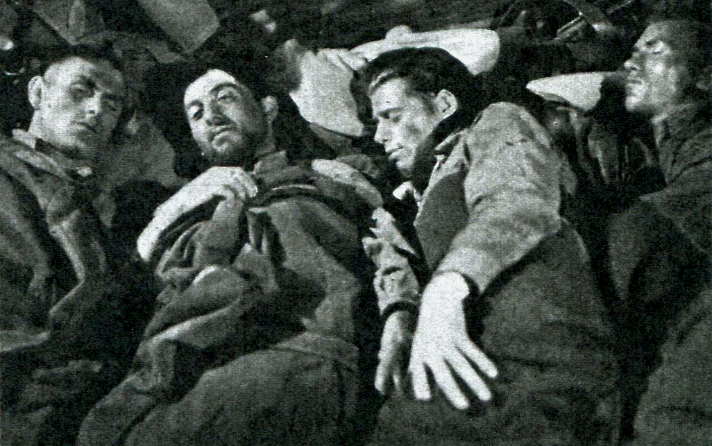 "I trecento della settima" (Baffico, 1943)- foto di scena